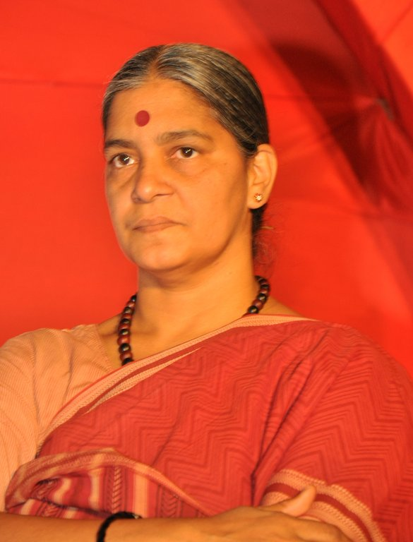 CPI LEADER Annie Raja AT CPI STATE CONFERENCE,KOLLAM 2012